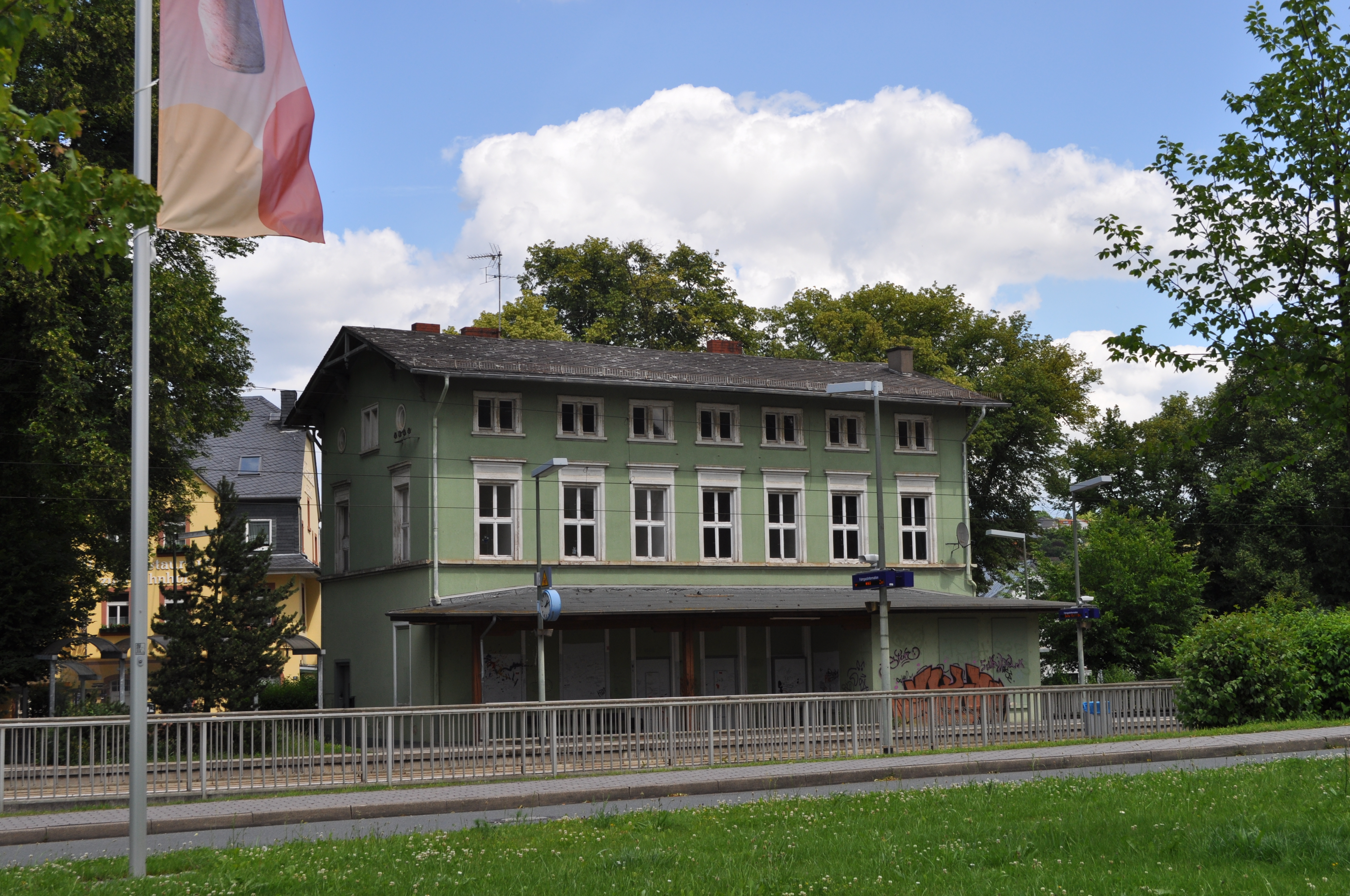 Niederselters, Bahnhof, Rückseite